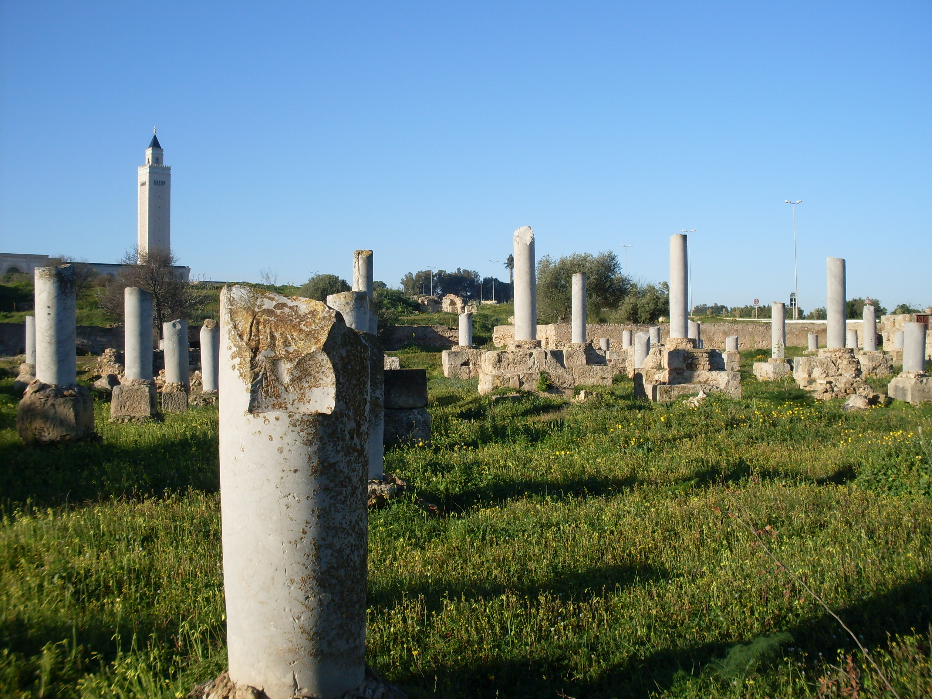 Basilique de Damous el Karita avec en arrière plan la mosquée el Abidine